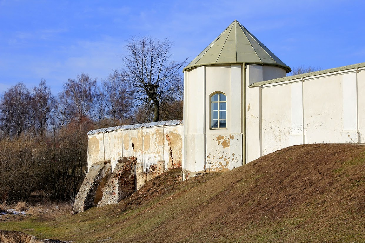 Івянец. Касцёл Св. Міхала Арханёла. Агароджа з вежай